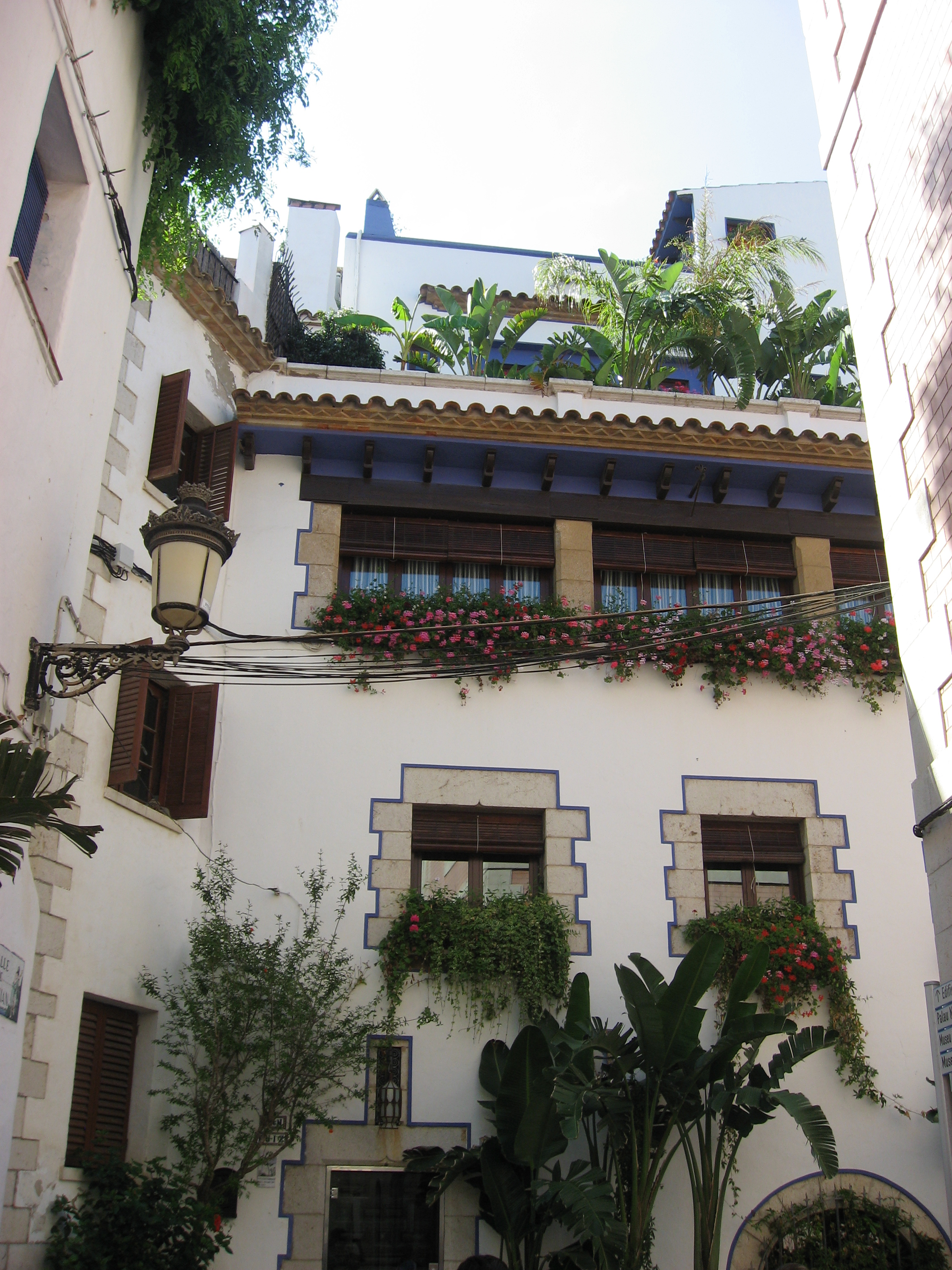 Davallada davant del carrer Sant Joan - Streetview Sitges